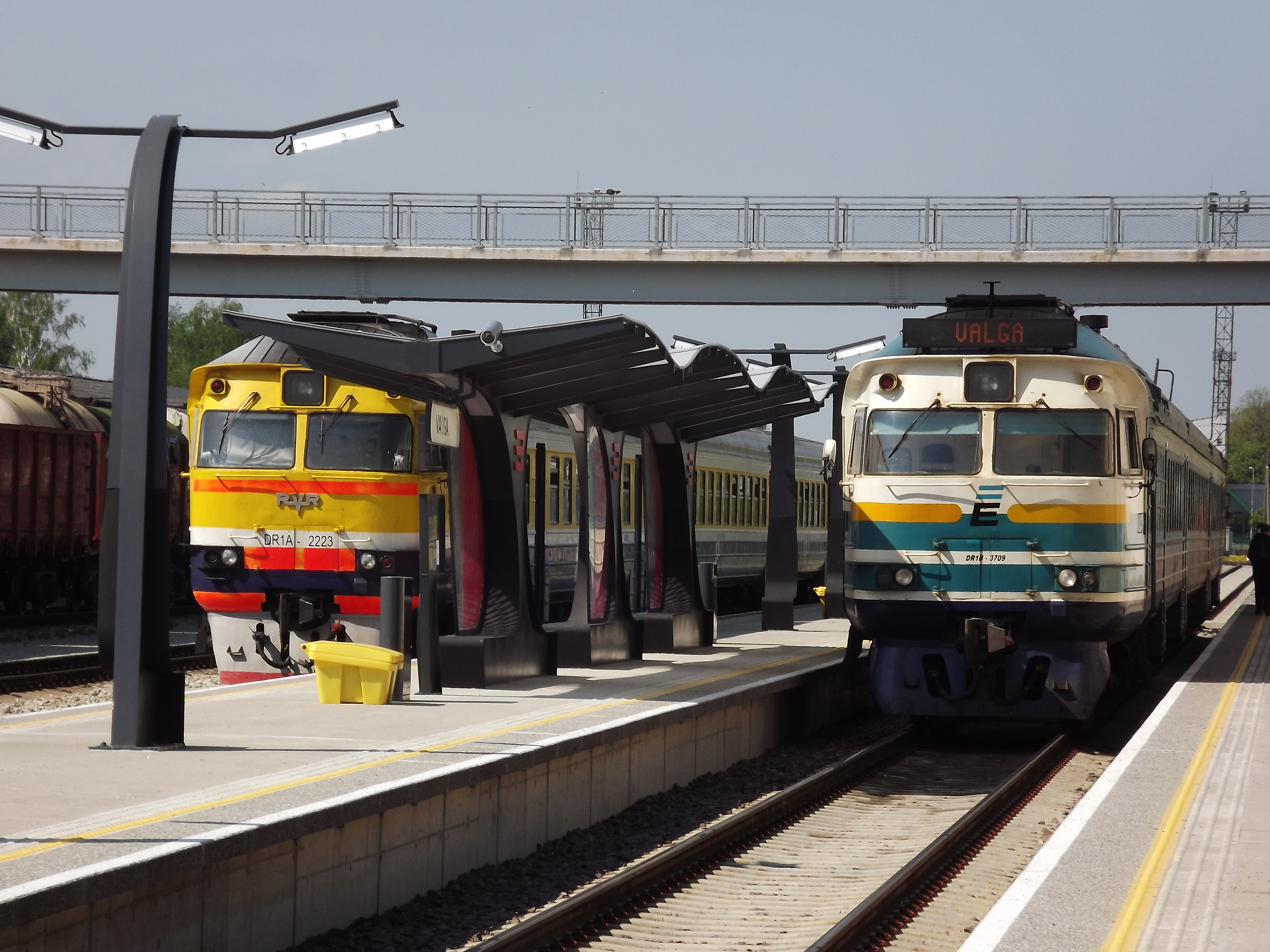 Läti raudtee diiselrong DR1A ja Edelaraudtee reisirong DR1B